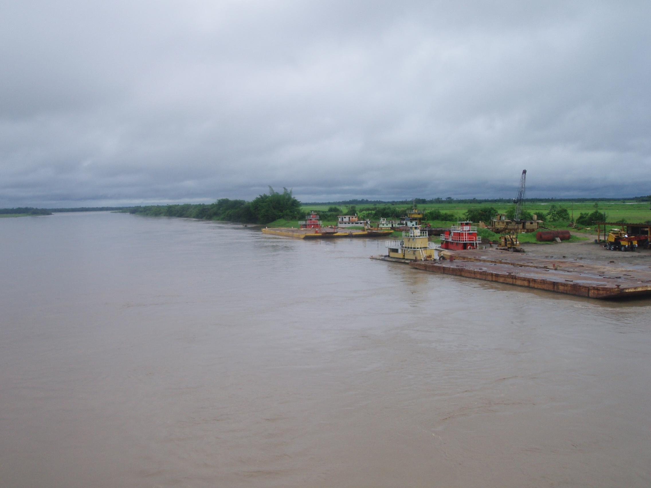 Rio Meta en Puerto López (Meta) Colombia